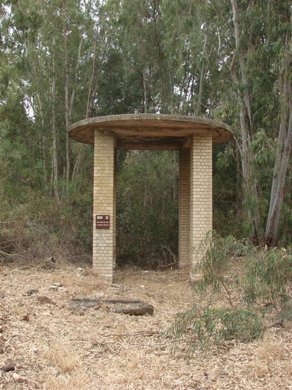 תחנת הרכבת בית נבאללה - בסיס מגדל המים